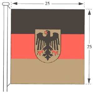 Kfz-Stander Muster II gemäß der Anordnung über die deutschen Flaggen vom 13. November 1996 in der Größe 25 cm x 25 cm. Verwendung durch Bundesminister, Vizepräsidenten des Deutschen Bundestages, des Bundesrates und des Bundesverfassungsgerichtes.